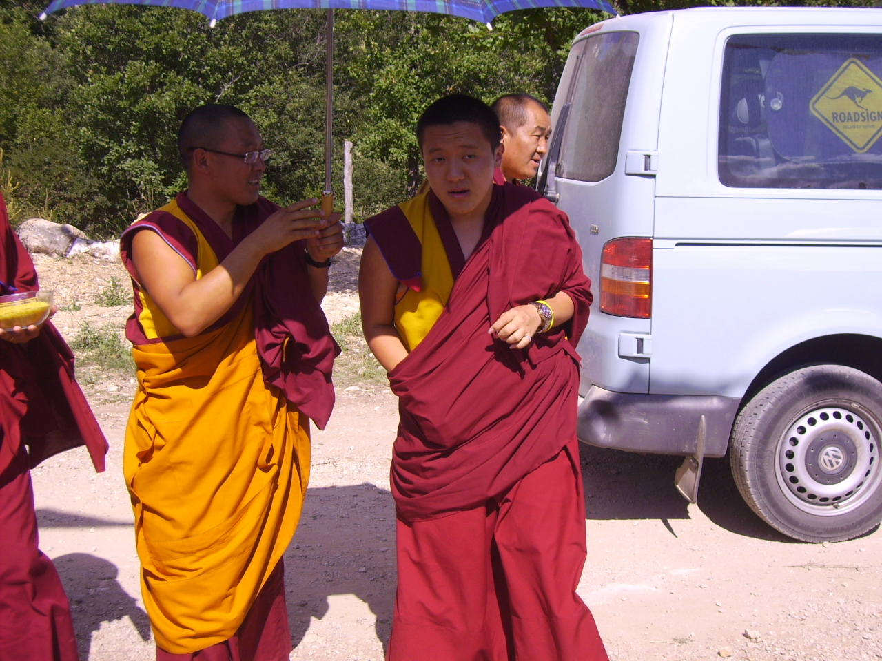 sua santidade dilgo khyentse yangsi rinpoche - retiro de guru yoga. (na veia!!)